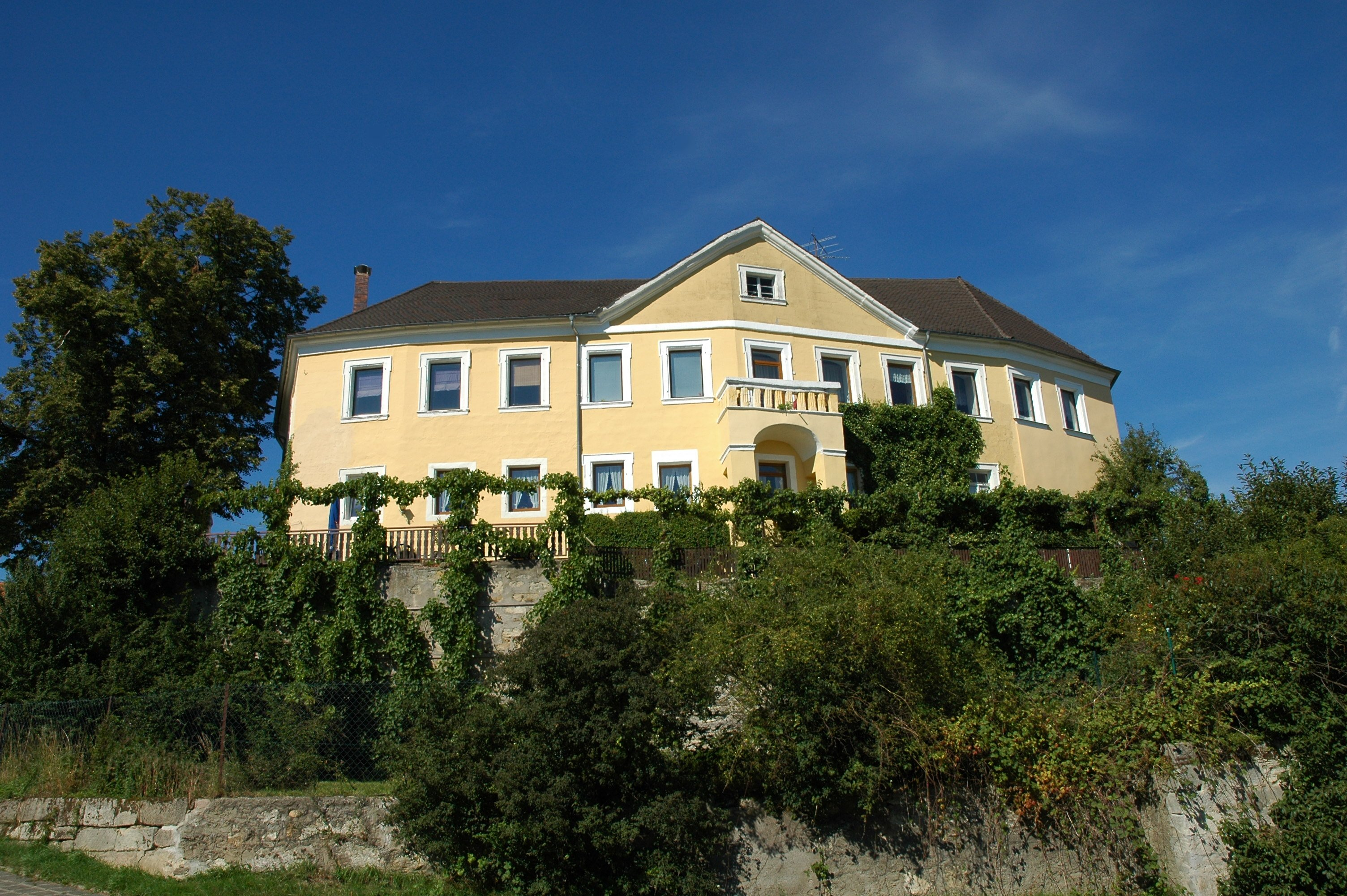 Schloß Marloffstein, Gemeinde Marloffstein, Landkreis Erlangen-Höchstadt